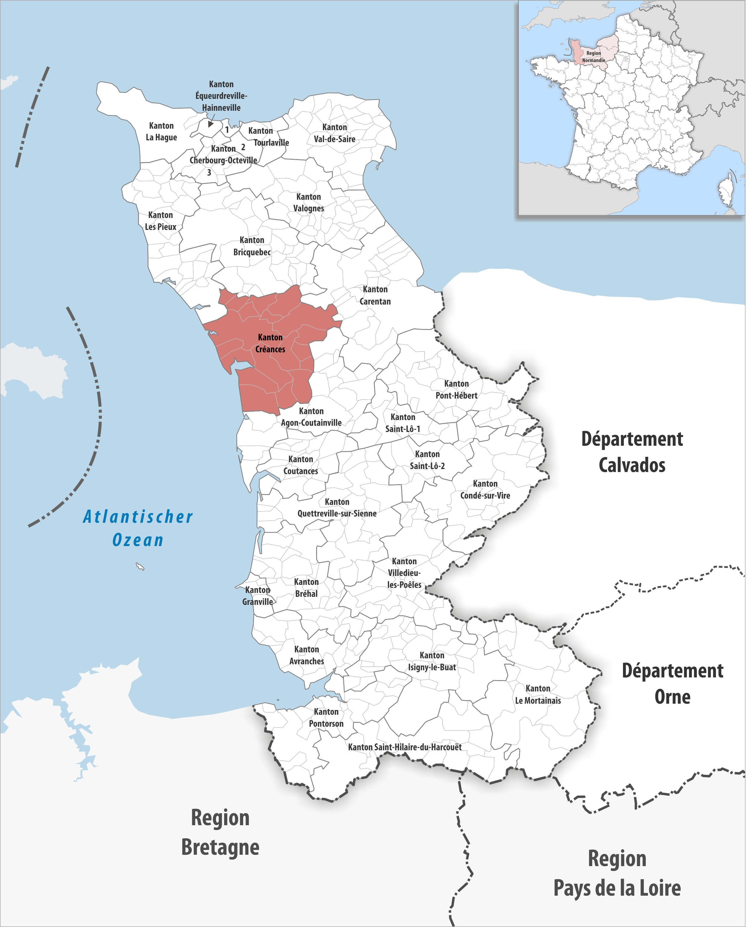 Lage des Kantons Créances